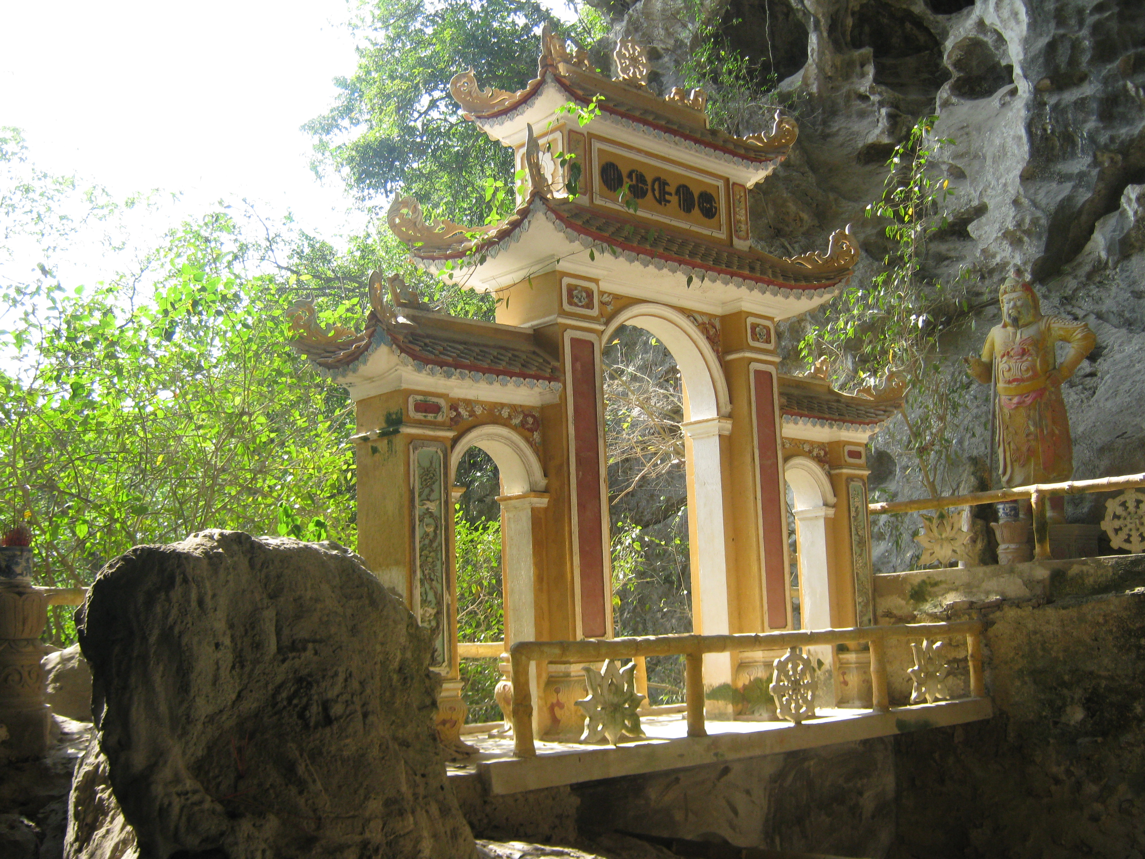 Chùa Địch Lộng ở Ninh Bình.